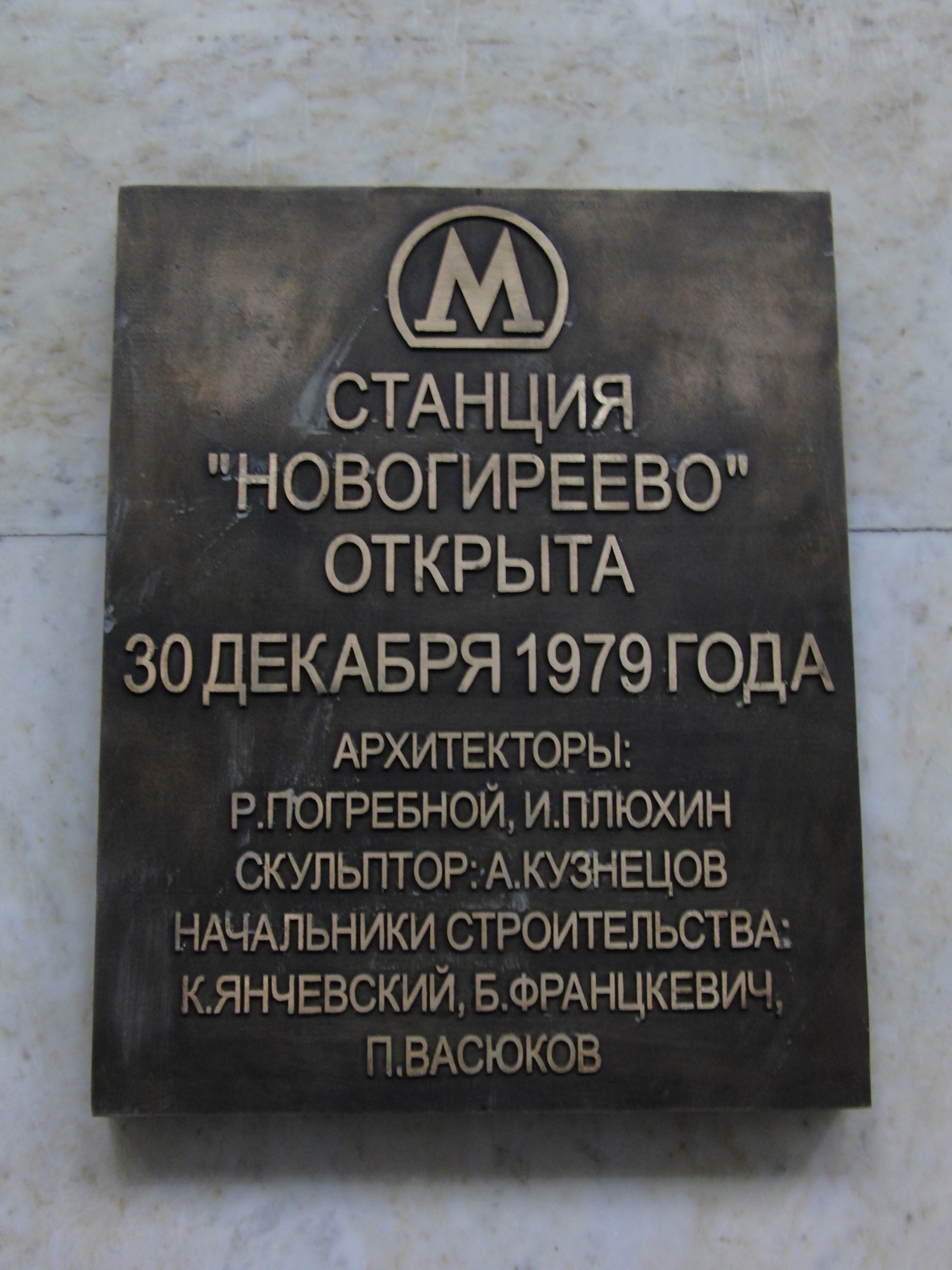 Novogireevo (Новогиреево)